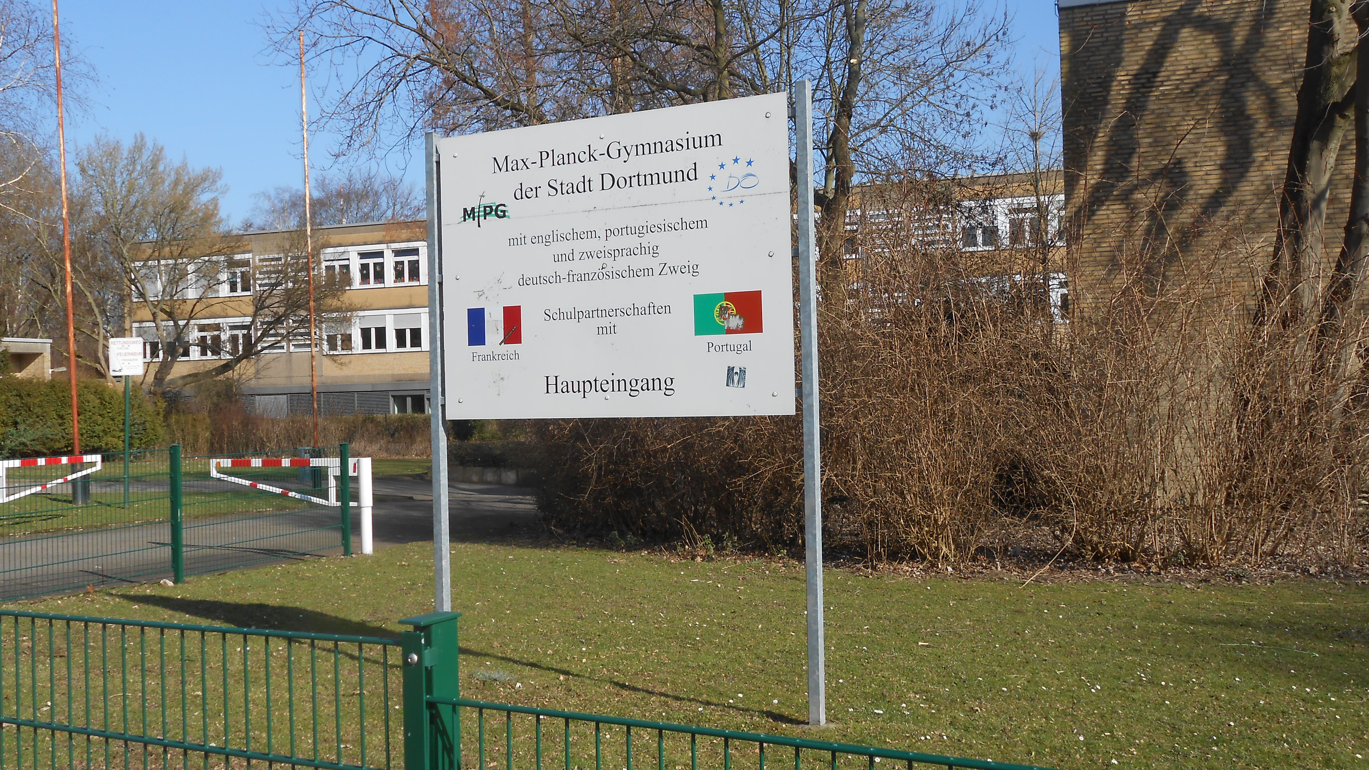 Schild vor der Aula des Max-Planck-Gymnasiums an der Ardeystraße in Dortmund (März 2014)